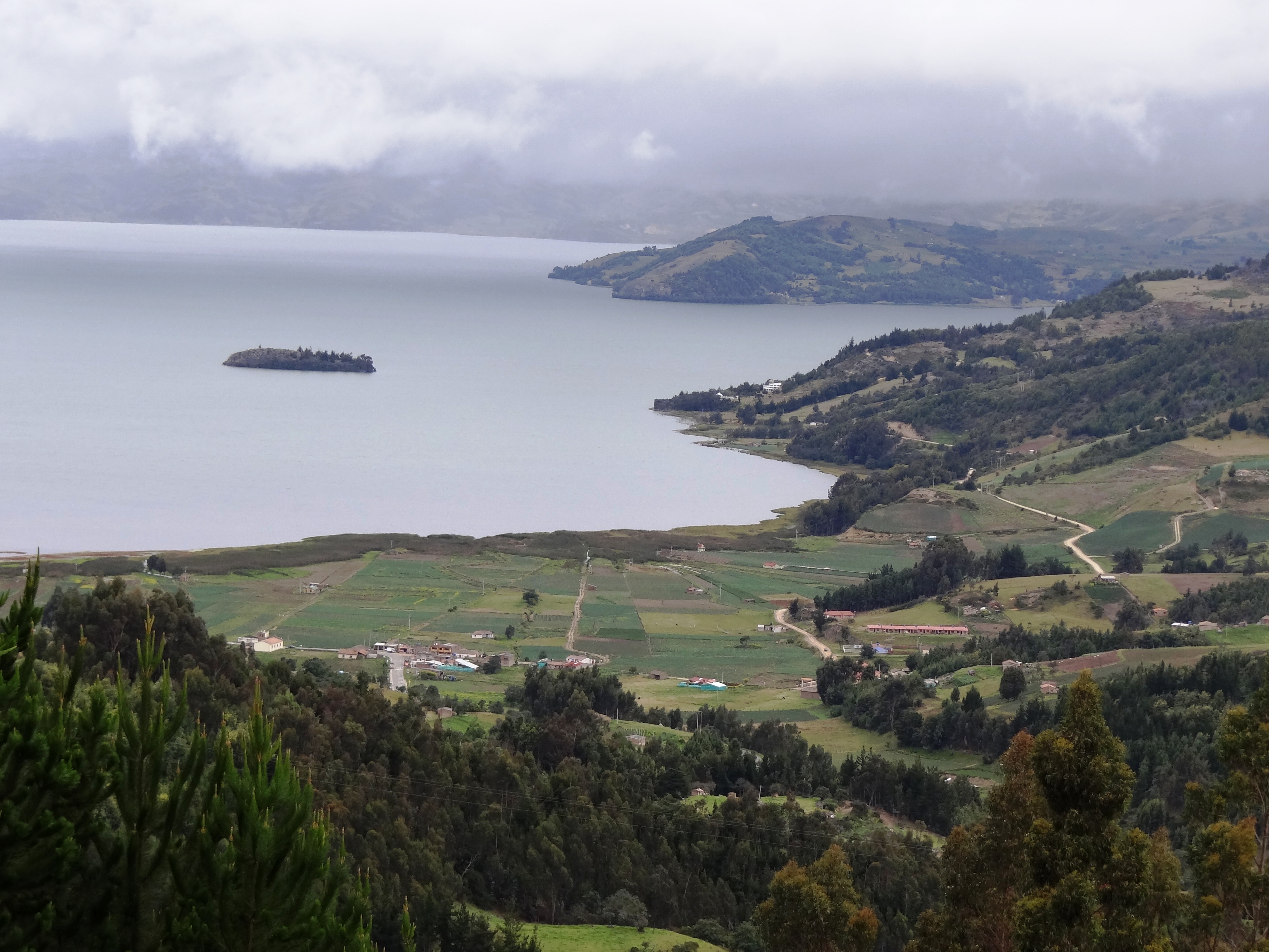 Laguna de Tota, departamento de Boyacá, Colombia. Tomada desde El Crucero